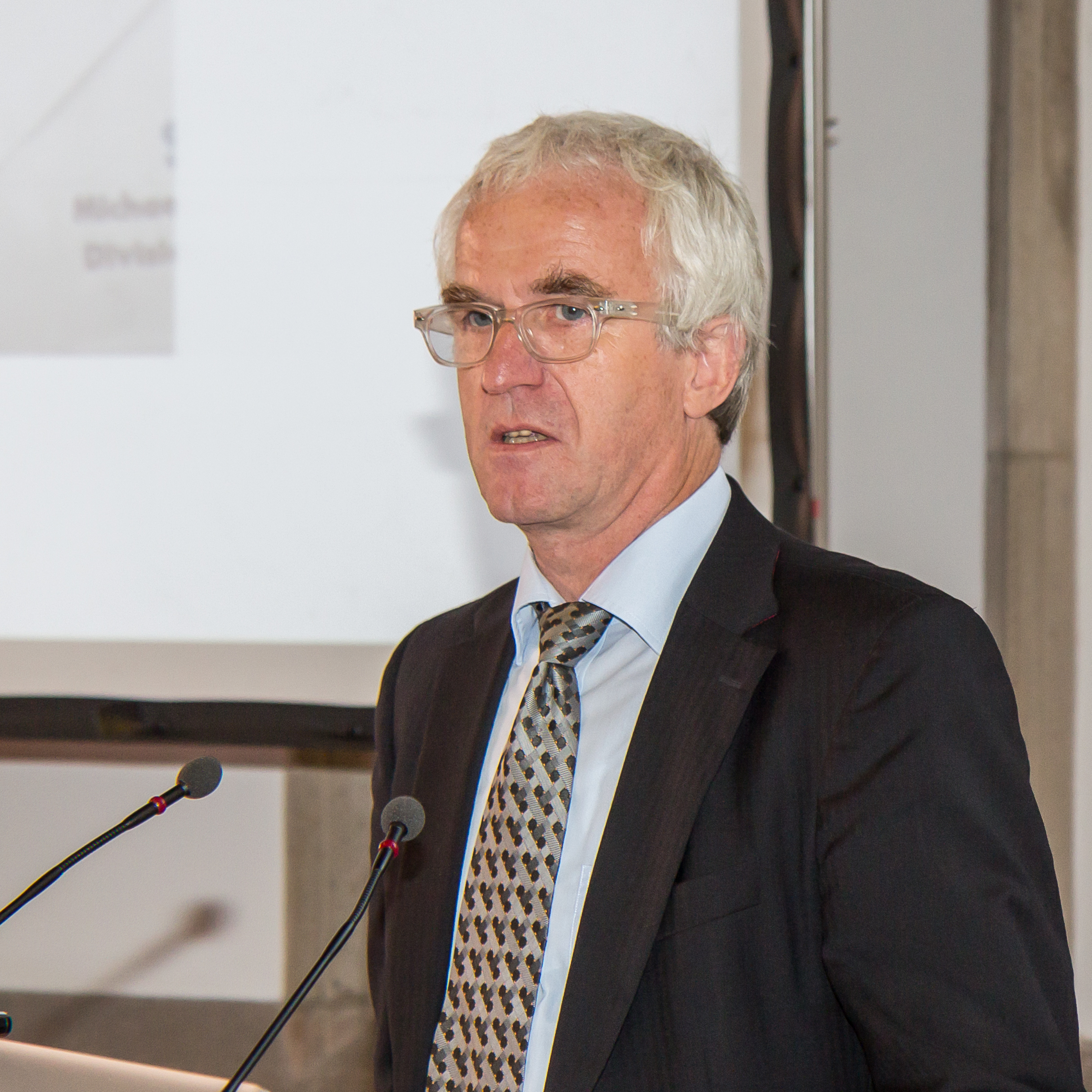 Verleihung Zülch-Preis 2016 im Hansasaal des Historischen Rathauses von Köln. Foto: Prof. Dr. Peter Lichter (Deutsches Krebsforschungszentrum/Universität Heidelberg) hält die Laudation auf Stefan Pfister